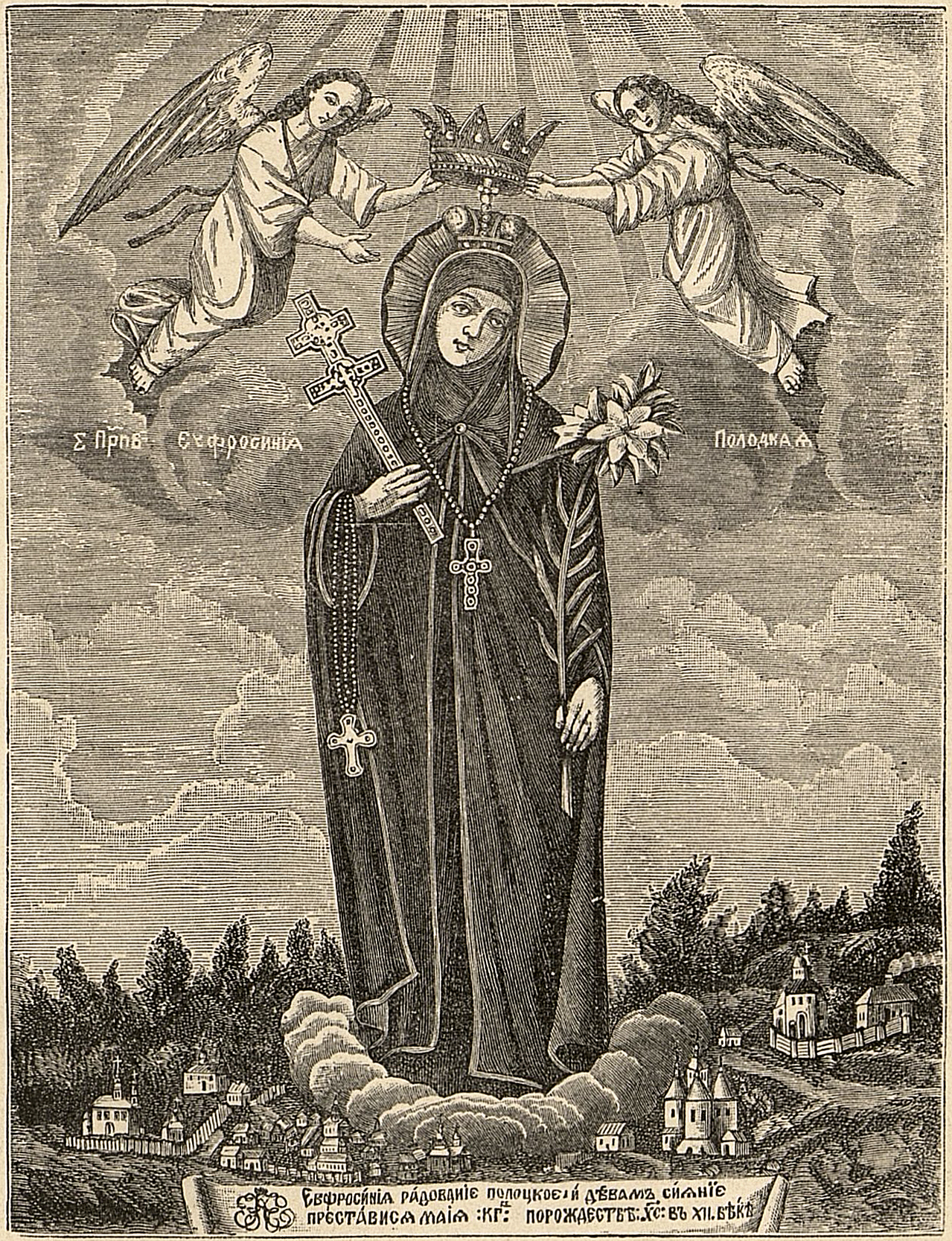 Беларуская (тарашкевіца): Абраз Эўфрасіньні Полацкай (Eŭfrasińnia Połackaja) з краявідам Полацку (Połacak)